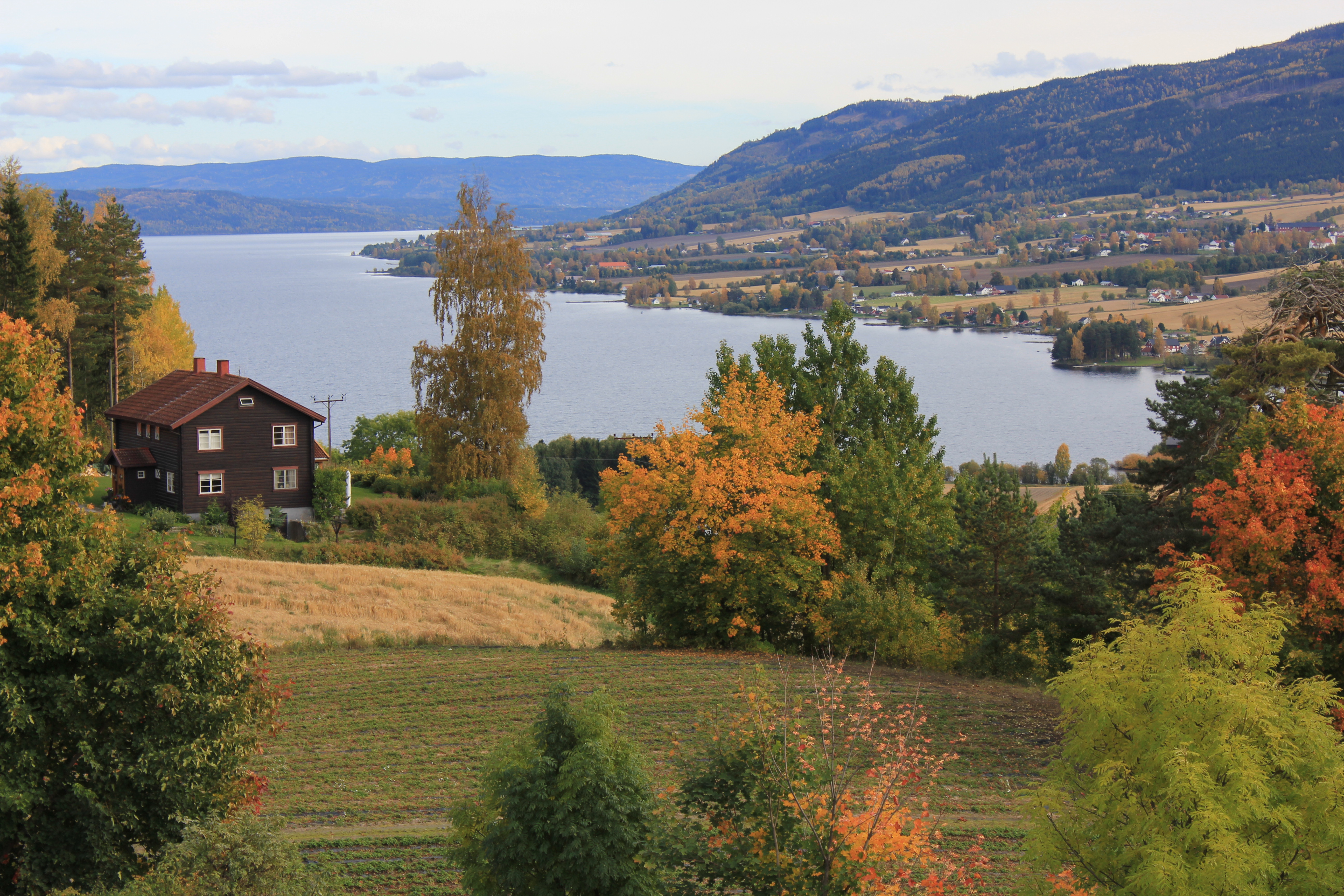 Totenvika sett fra Balke, Østre Toten. Ei bygd ved Mjøsa.